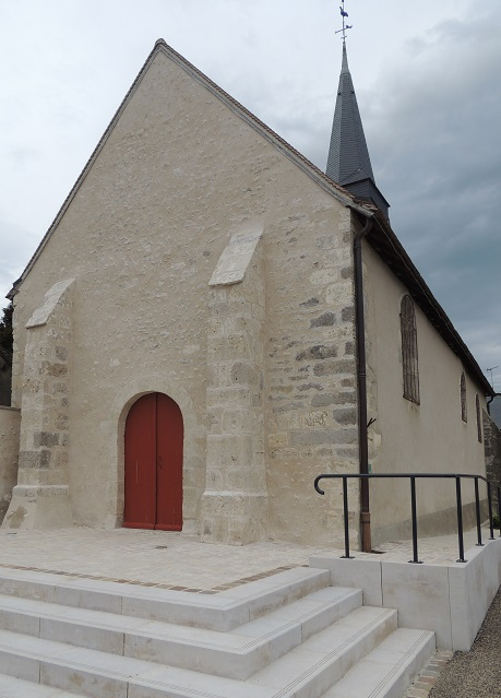 Église Saint-Jean de Tourailles, le péron et la facade occidentale et la facade Sud et la flèche du clocher à l'arrière . A noter on aperçoit la croix de croisé sur le coté Sud du renfort de droite sur la photo à 1.50m de hauteur peut être. Aucune autre ouverture que la porte sur la facade ouest et 3 petites baies sur la facade Sud dénuées toutes deux de la moindre décoration